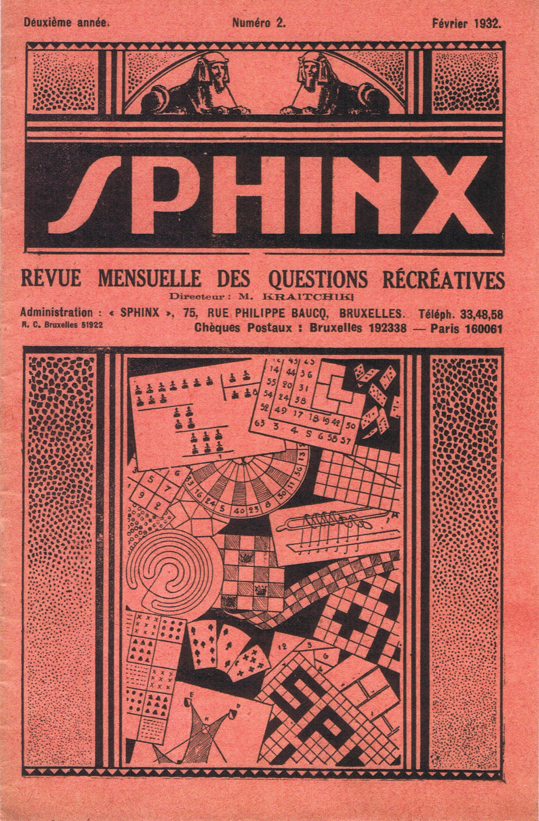 Sphinx, Revue mensuelle des questions récréatives